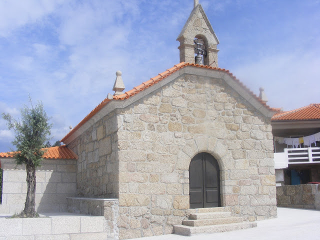 Amarante Fotografia da Igreja Matriz de Cepelos